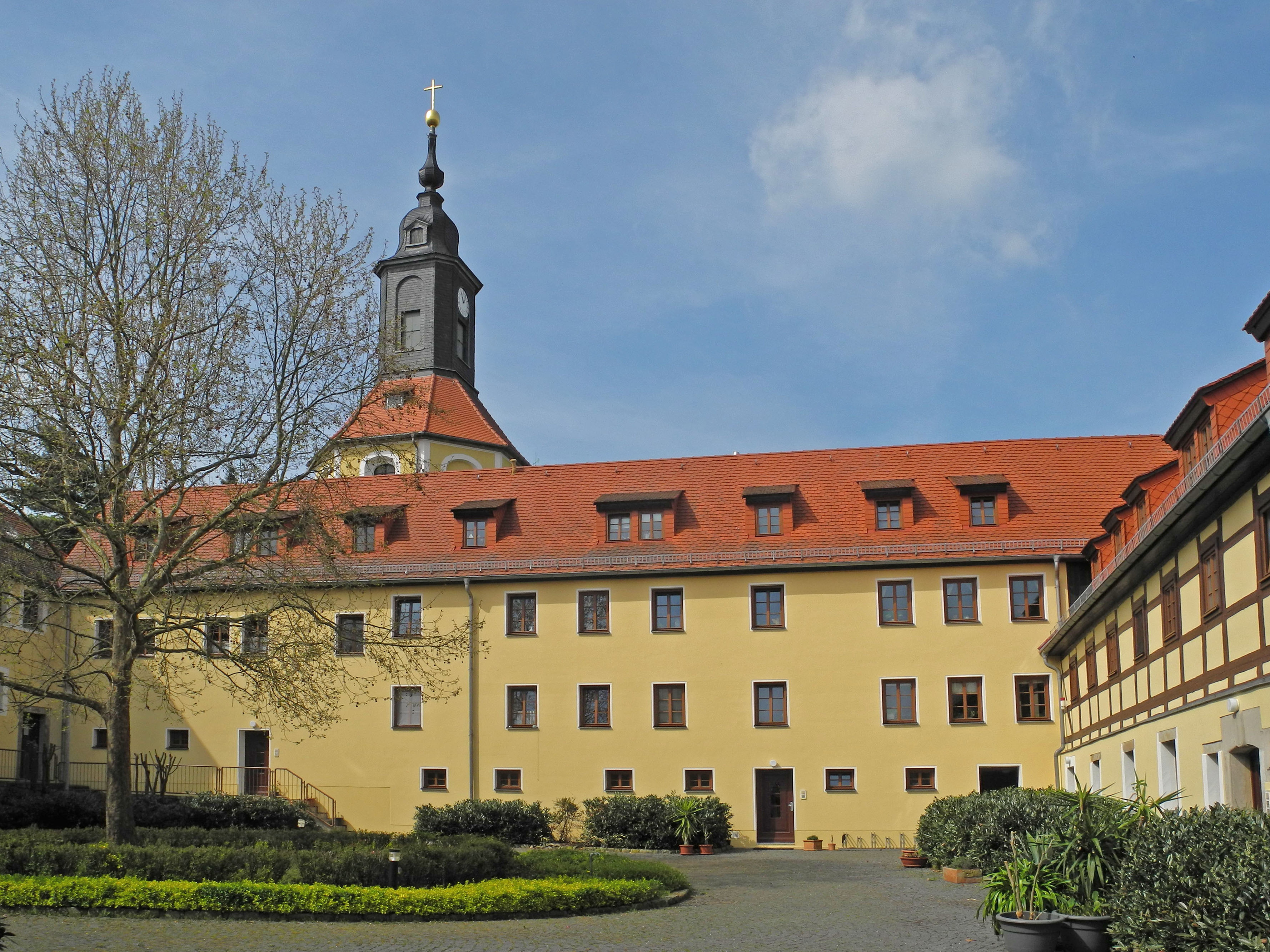 Ehem. Eulitzgut, jetzt Wohnhaus der Reinhard und Sonja Ernst-Stiftung in Kesselsdorf, Christian-Klengel-Str. 23